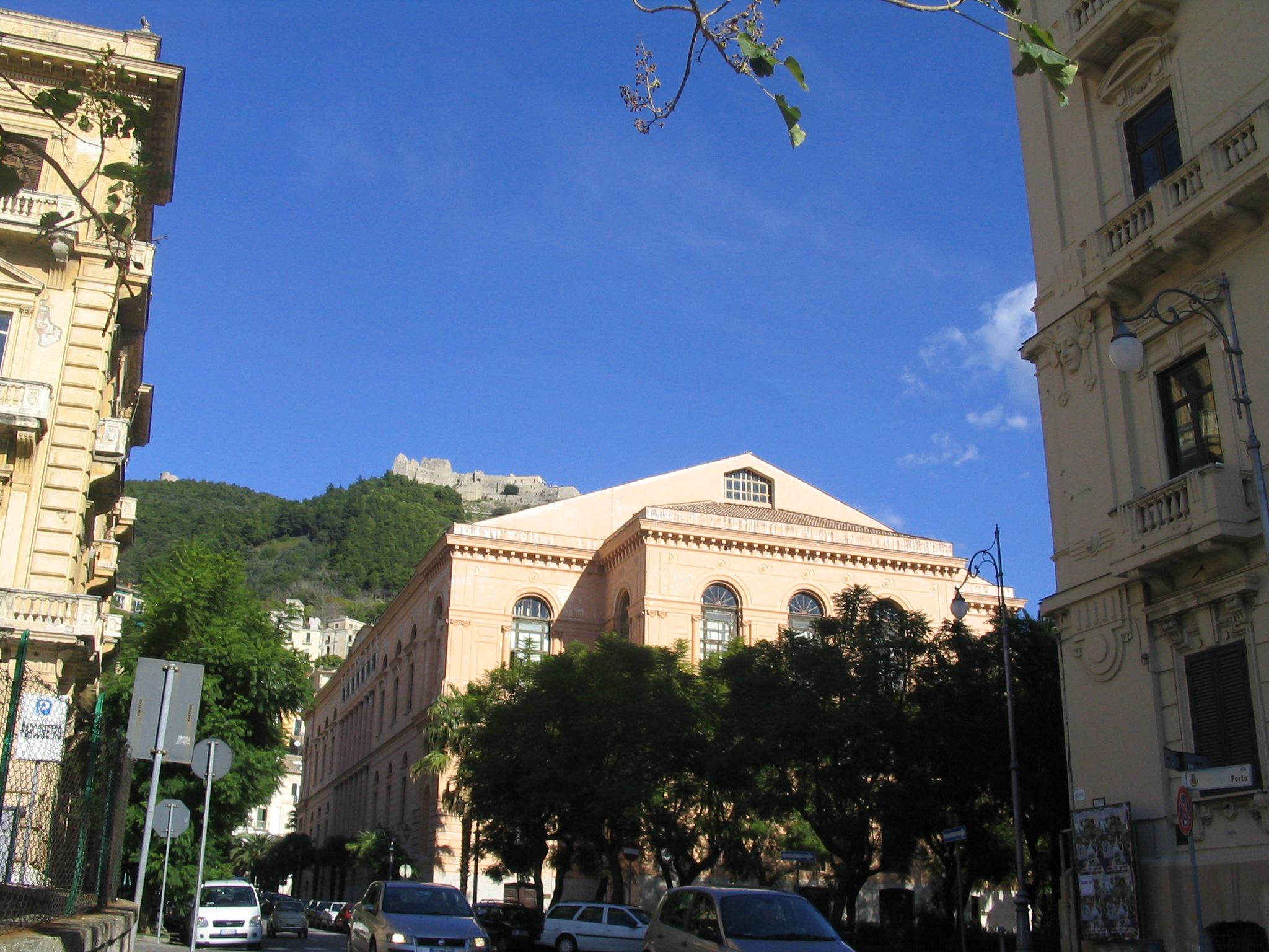 Giuseppe Verdi Theatre in Salerno, Italy